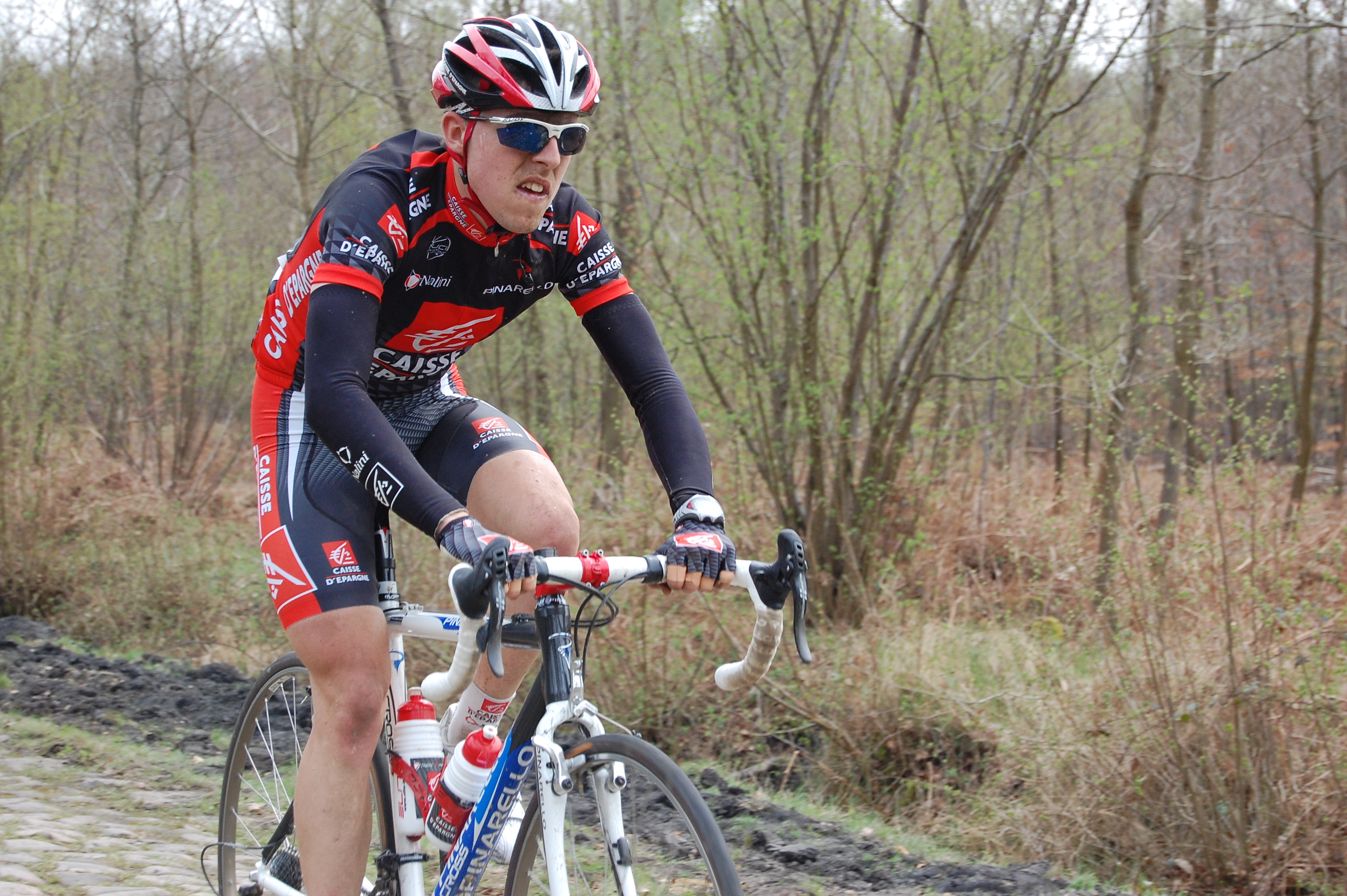 Angel Madrazo, Paris-Roubaix 2009 (Arenberg).